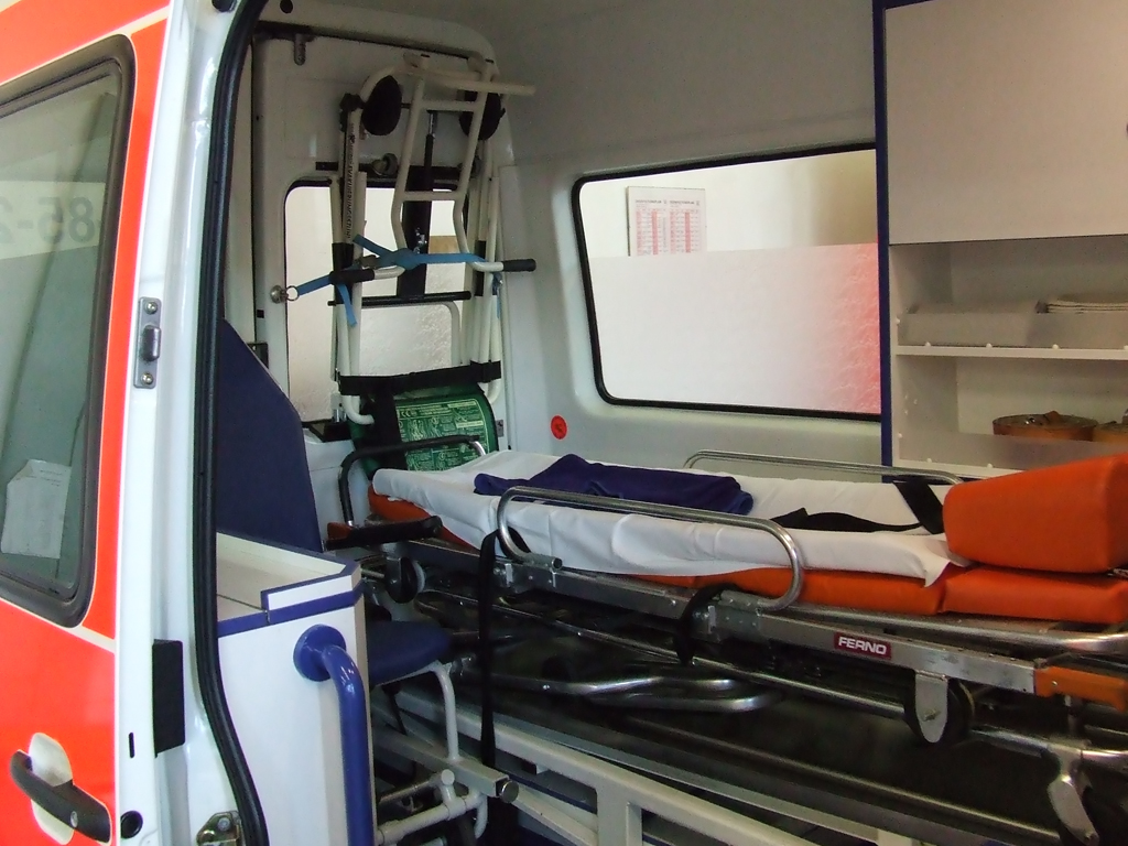 Im Bild zu sehen, über den Seiteneinstieg des KTWs (vlr): Tragestuhl, Zutragestuhl (bzw. "EvacChair"), Trage